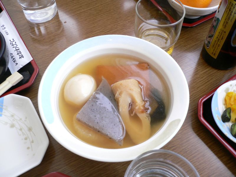 おでん（神奈川県足柄下郡箱根町仙石原台ケ岳1251、箱根ロープウェイ大涌谷駅3Fの「レストラン大涌谷」（現・大涌谷スカイレストラン））